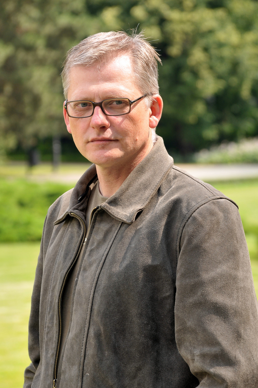 Tytus Wojnowicz w Parku Ujazdowskim w Warszawie, czerwiec 2013.